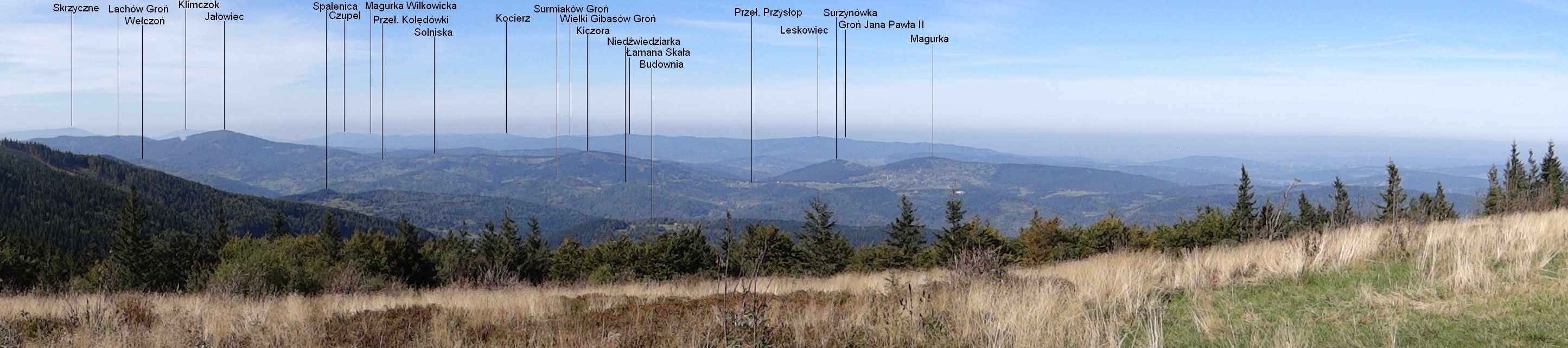 Panorama widokowa z Hali Kucałowej (z Jasnej Góry)